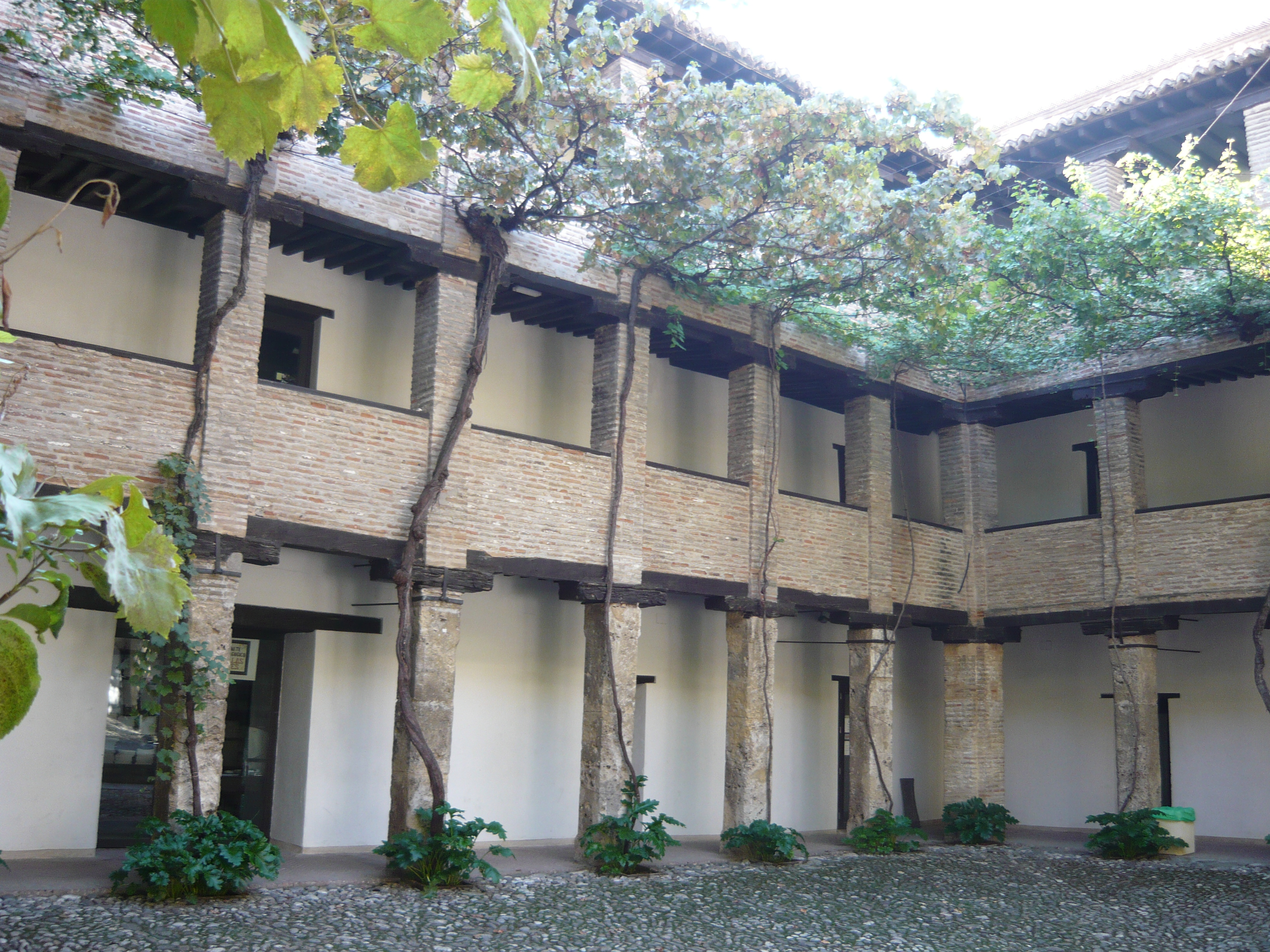 Columnas de piedra del patio del Corral del Carbon, en Granada.